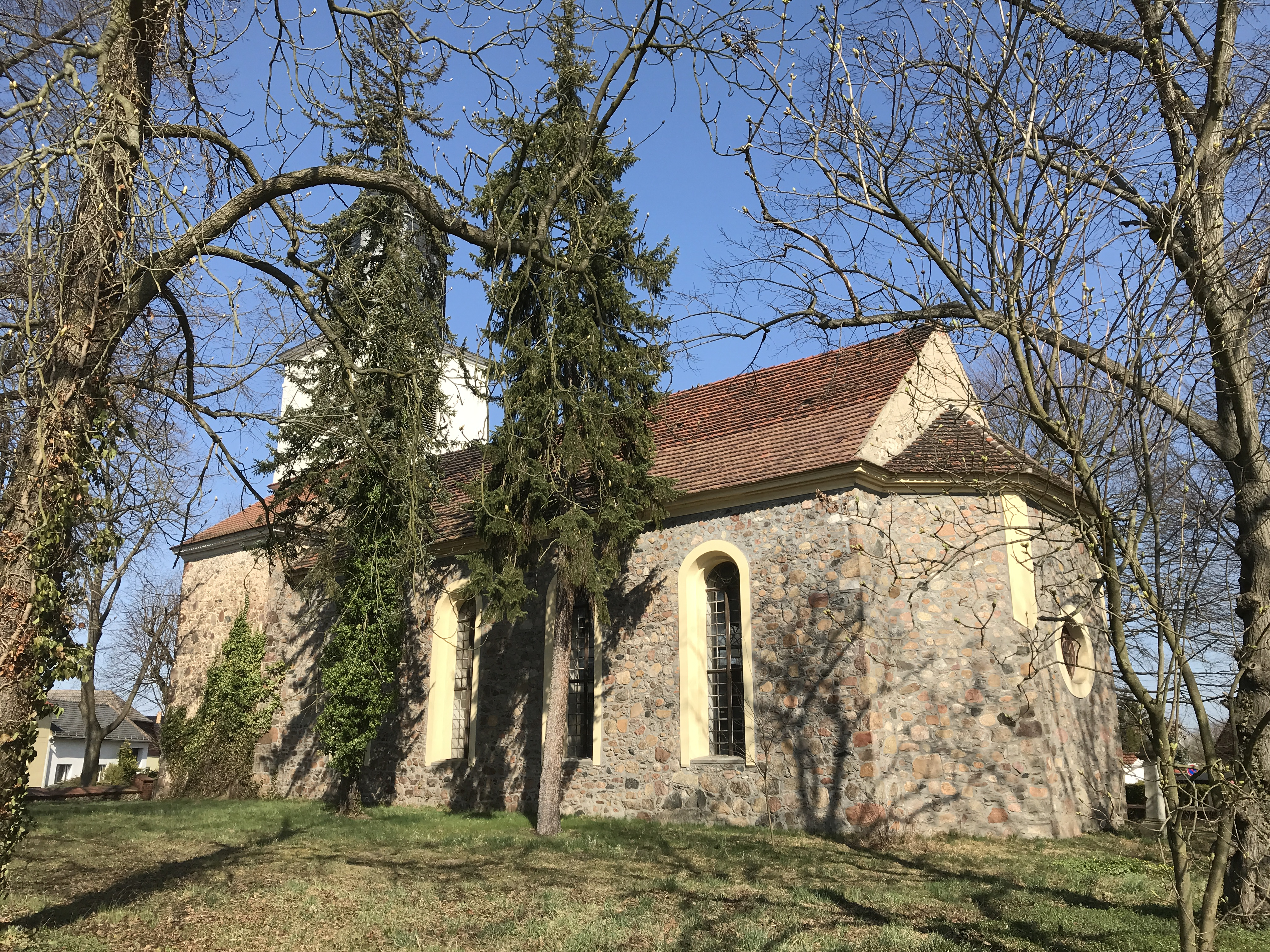 Die Dorfkirche in Gehren der Gemeinde Heideblick entstand in den Jahren 1823 bis 1825 als klassizistische Saalkirche auf einem Vorgängerbau aus dem 13. Jahrhundert.